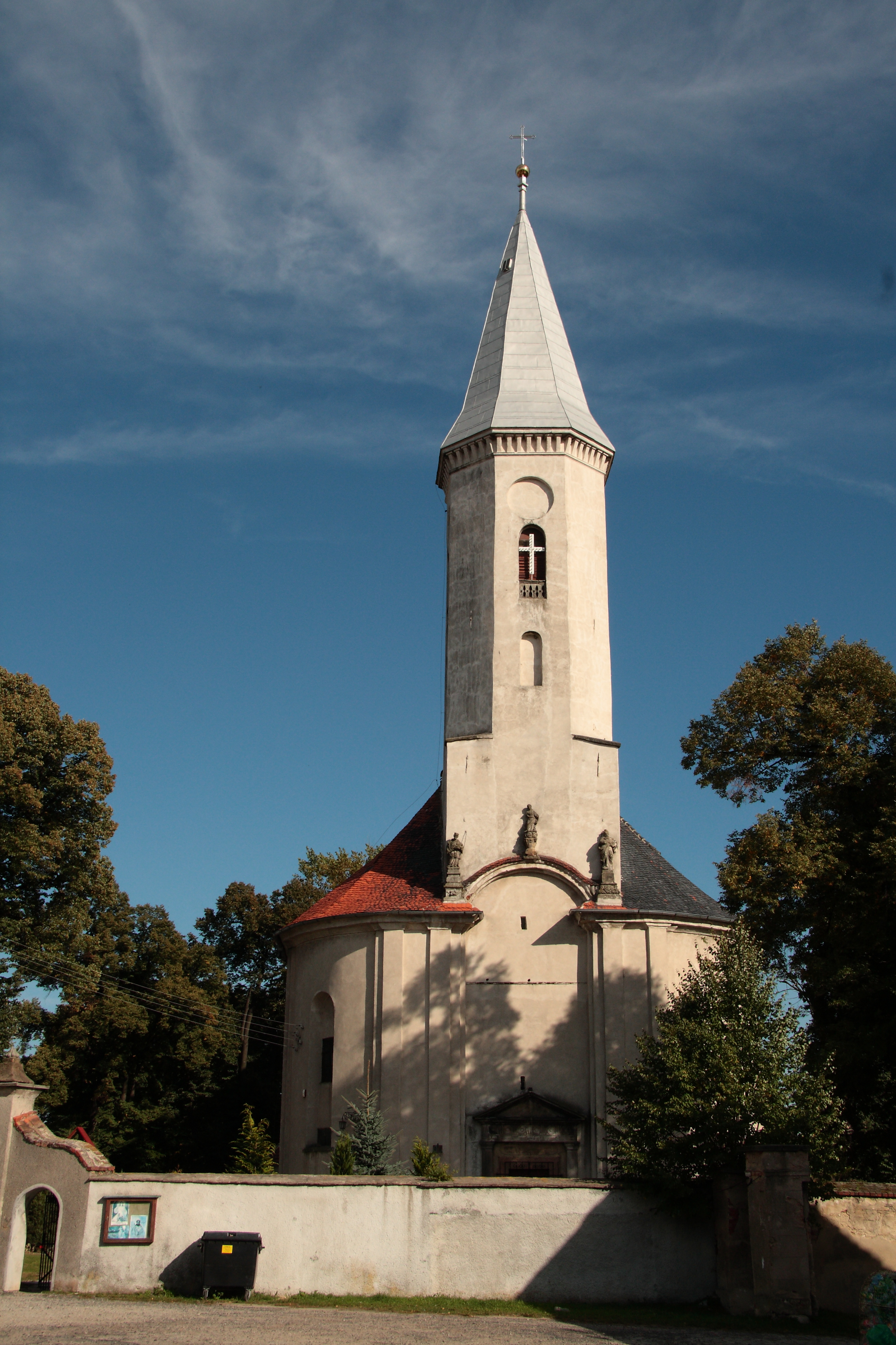 Mściwojów - rzymskokatolicki kościół parafialny p.w. Nawiedzenia NMP, 1 poł. XIX